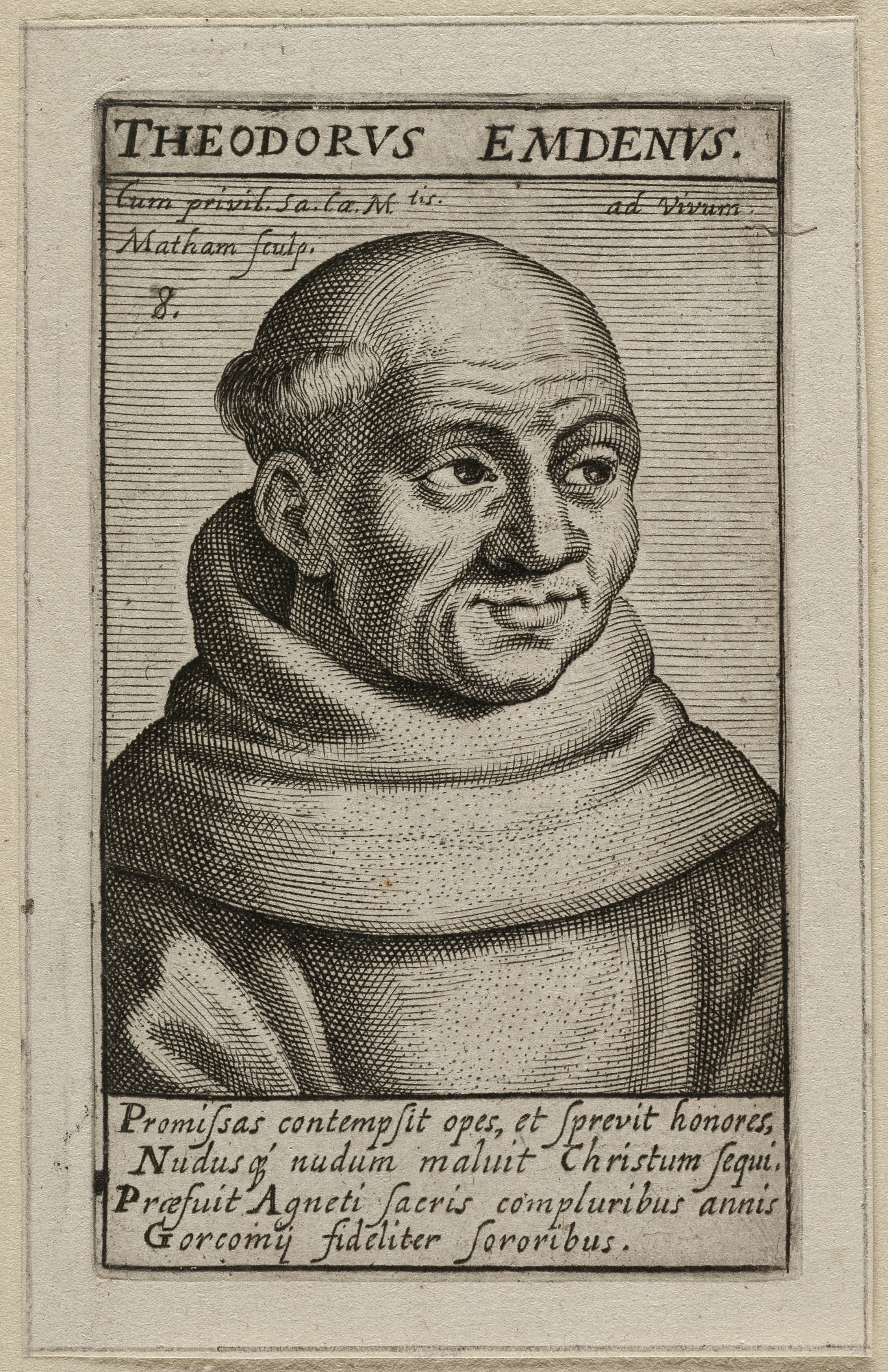 CollectieVoorhelm SchneevoogtInventarisnummerNL-HlmNHA_1477_53010727BeschrijvingDe heilige Theodorus van der Eem / Theodorus Emdenus.Achtste prent uit een genummerde, twintigdelige prentenserie getiteld 'De Martelaren van Gorcum'.Gravure door en uitgave van Jacob Matham, gesigneerd, linksboven genummerd '8'.FotonummerNL-HlmNHA_1477_53010727DocumenttypeHistorieprenten, tekeningen en foto'sPortrettenVervaardigerMatham, Jacob (1571-1631) UitgeverMatham, Jacob (1571-1631)Begindatum1617Einddatum1618TechniekGrafiek Drukwerk Trefwoordenheiligen LiteratuurNew Holstein Dutch, Matham, 125-2(2)